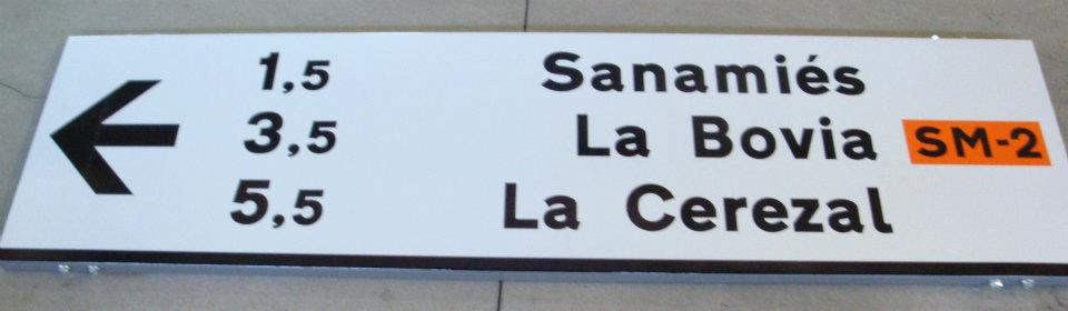 Señalización toponímica del conceyu